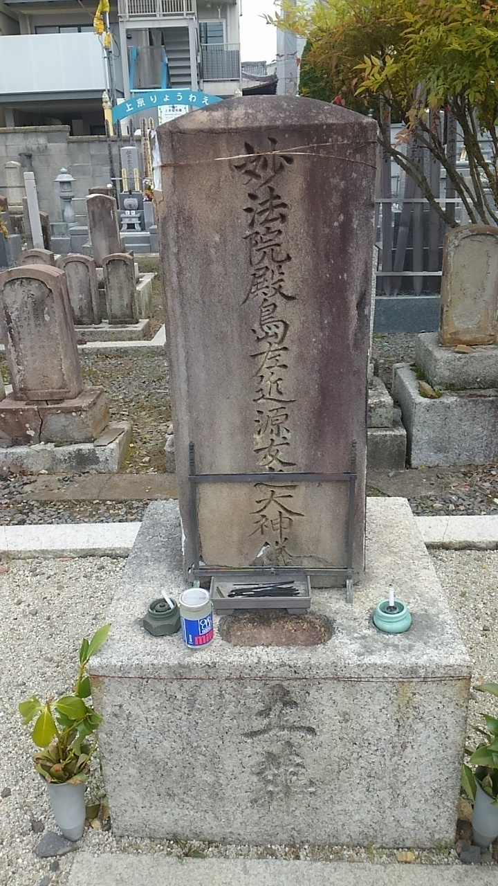 京都市立本寺の島左近の墓